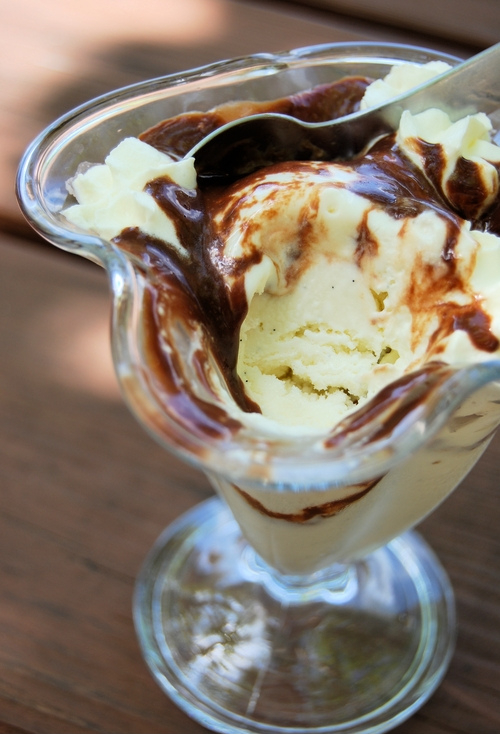 Coupe Dänemark (Vanilleeis mit Schokoladensoße) Dame blanche (Vanille-ijs met warme chocoladesaus eroverheen)